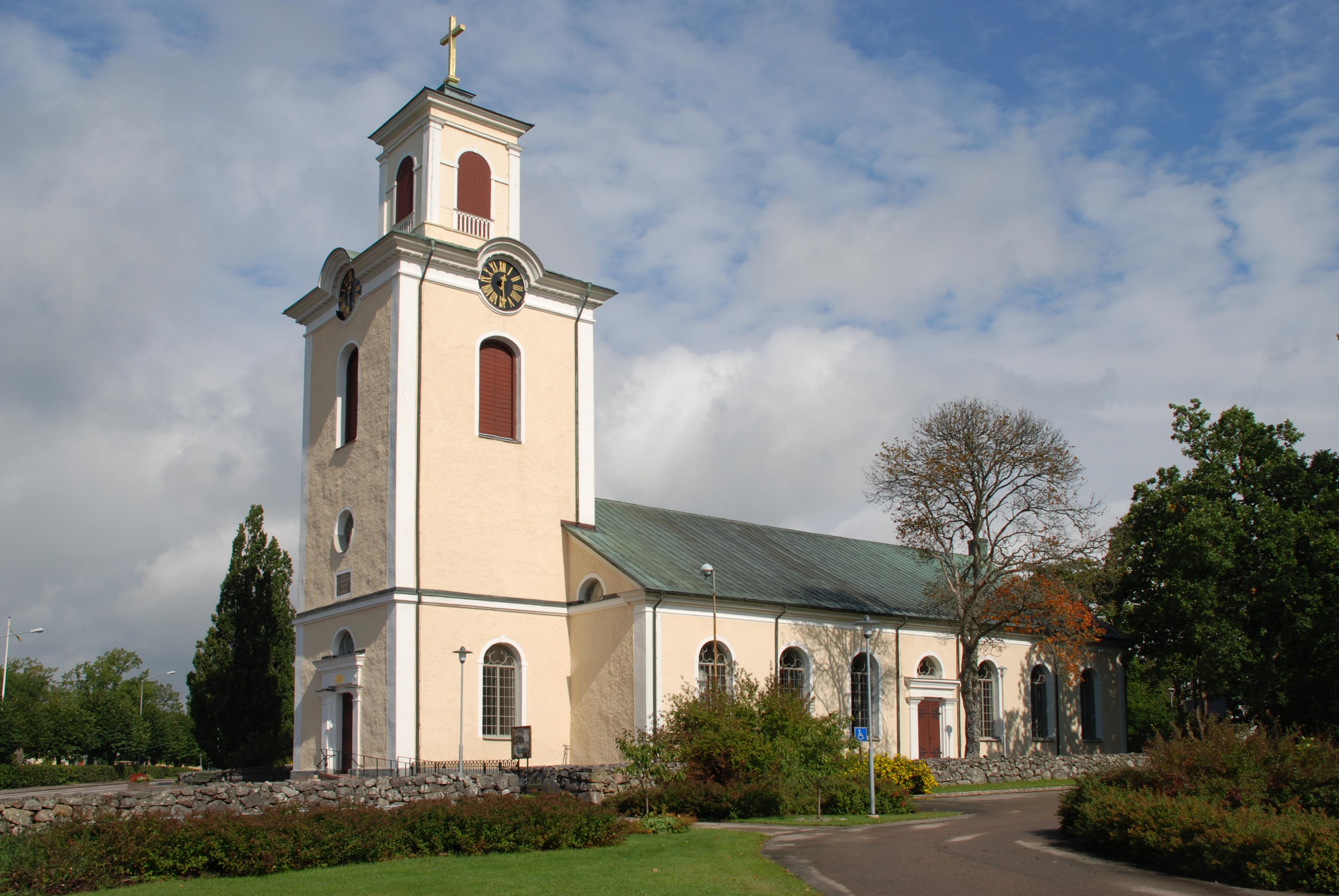 Lenhovda kyrka